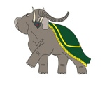 Insigne de l'escadrille "BR 66"